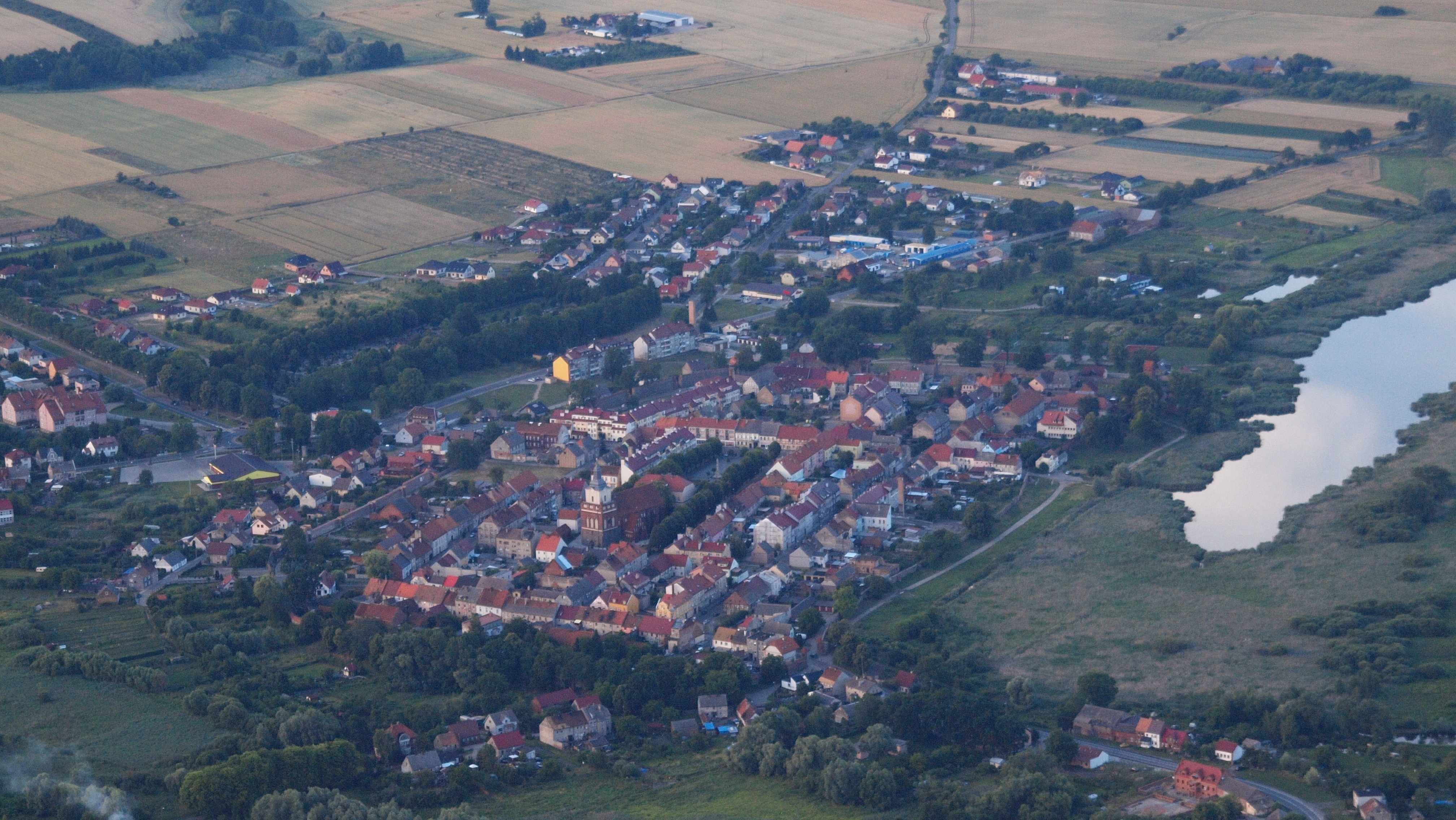 Mieszkowice, Luftaufnahme (2015)